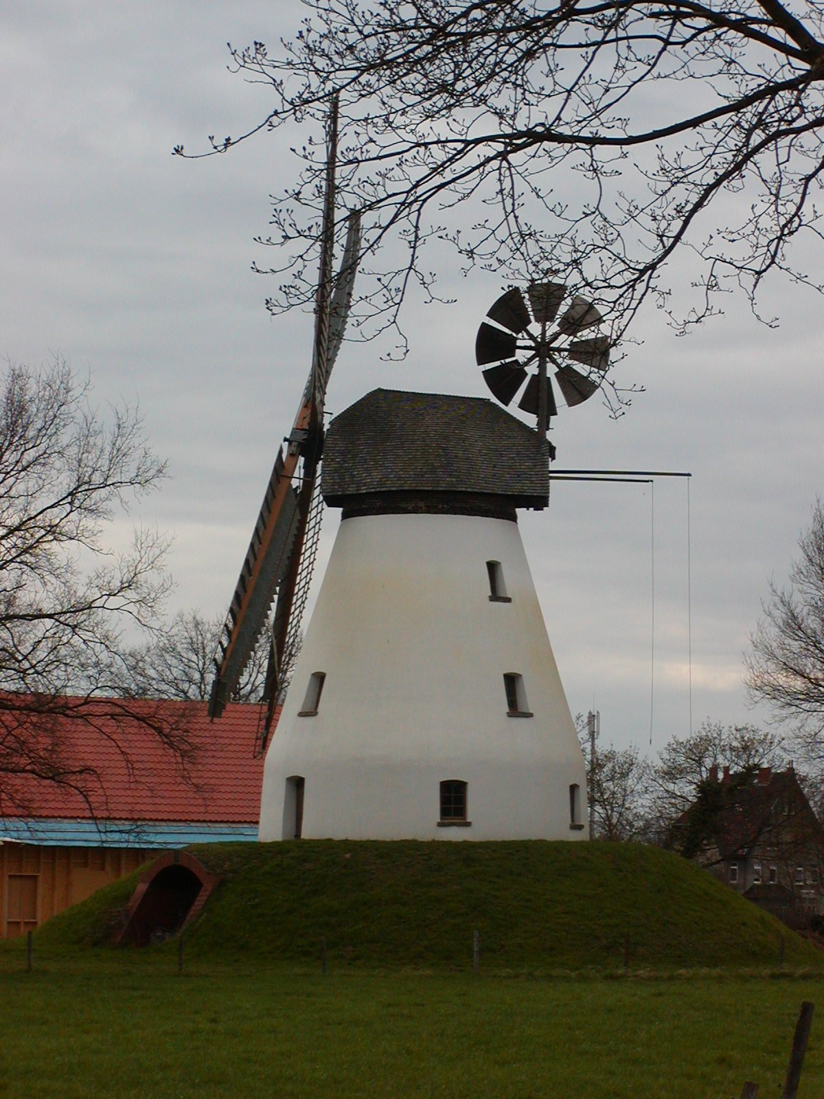 Windmühle Heimsen Sonstiges: ..